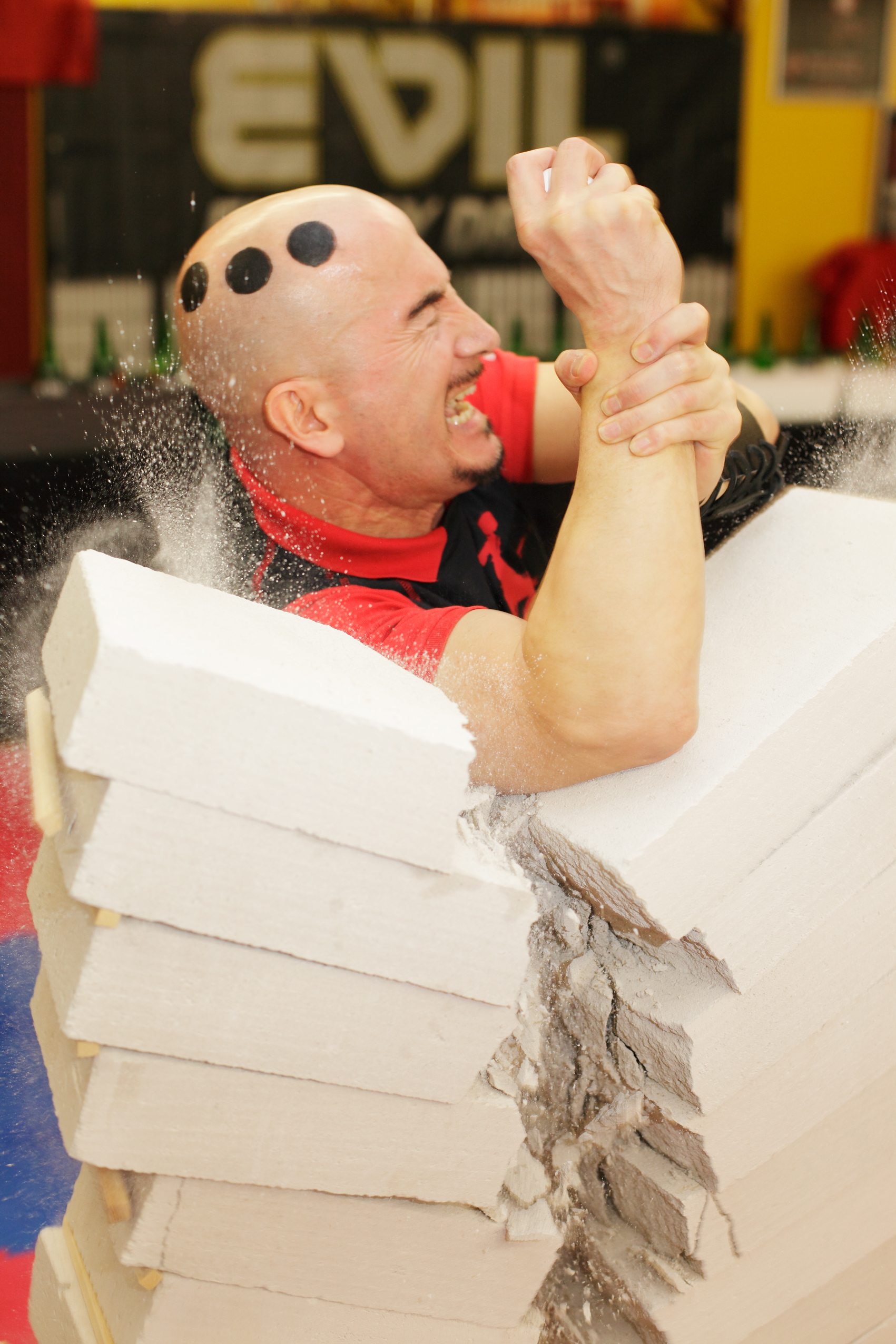 Guinness World Records - Ei Bruchtest von Joe Alexander am 11.11.2010 in Hamburg. Rekord: 24 Betonblöcke mit dem Ellenbogen zerschlagen, ohne dass das Ei kaputt geht.